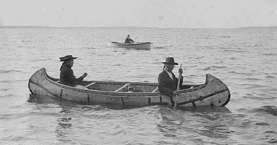 Ojibwe birchbark canoe